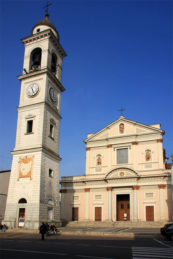 Chiesa parrocchiale di San Michele a Cameri